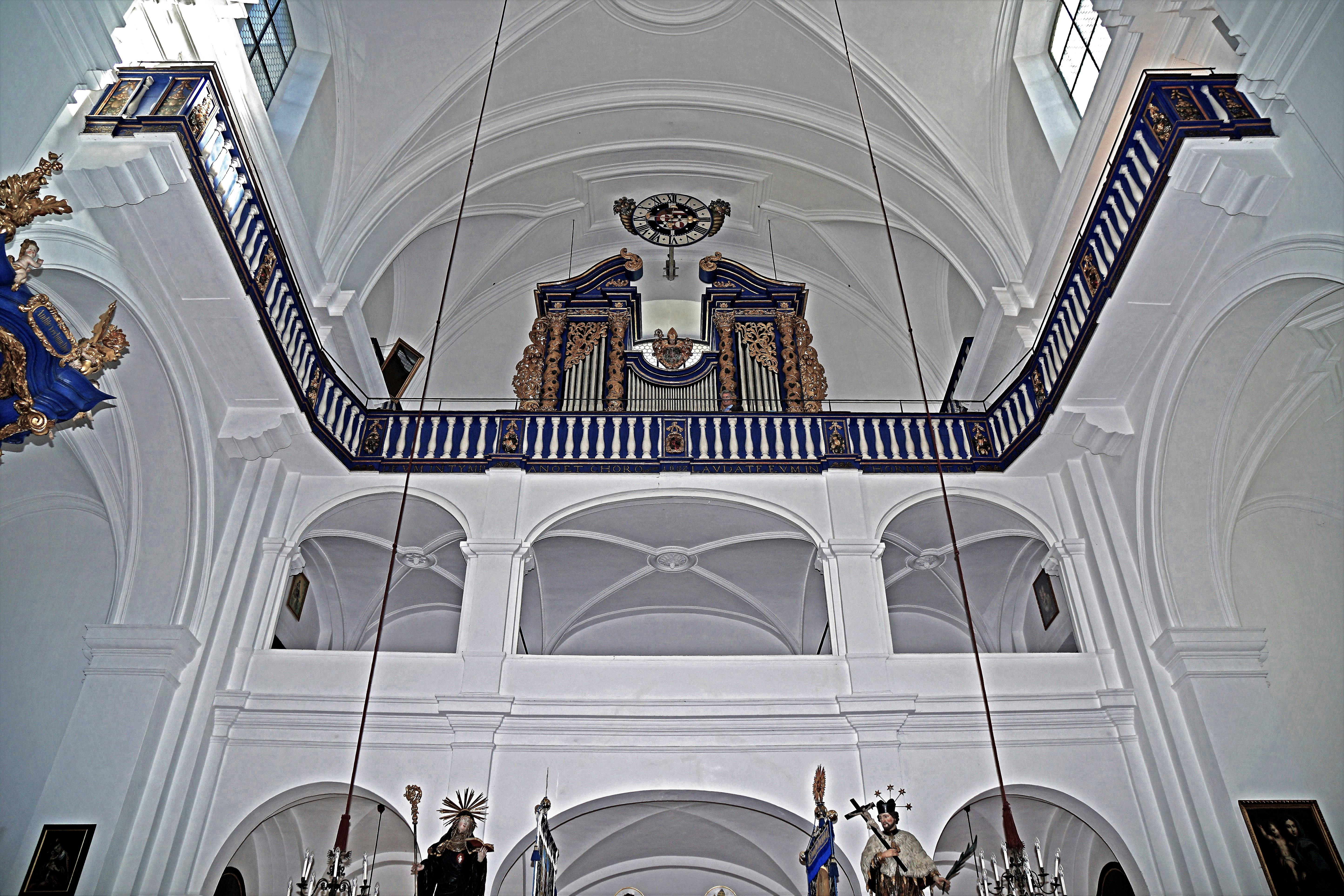 Wallfahrtskirche Maria Plain, Innenansicht gegen die Orgelempore